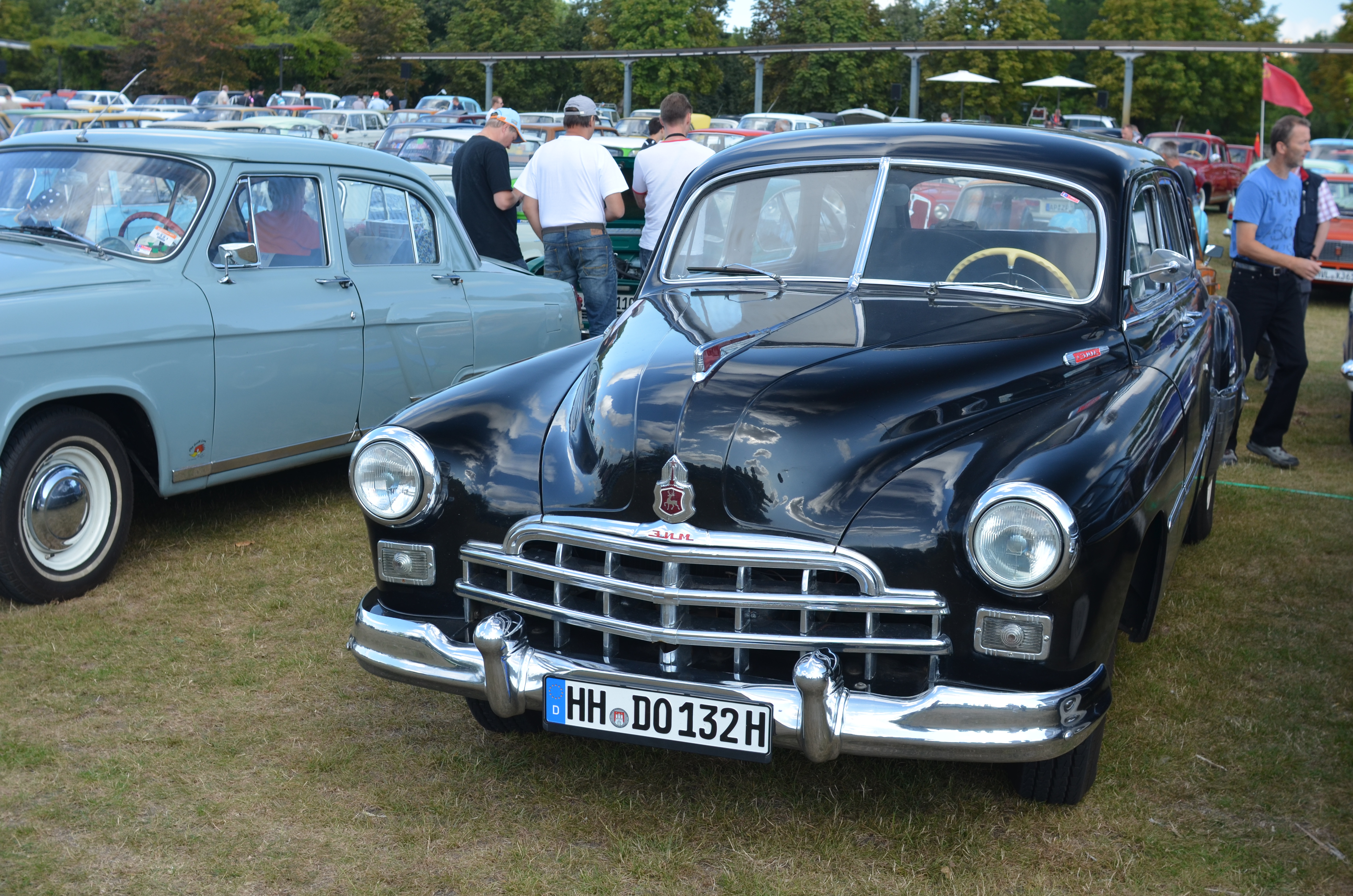 GAZ-12